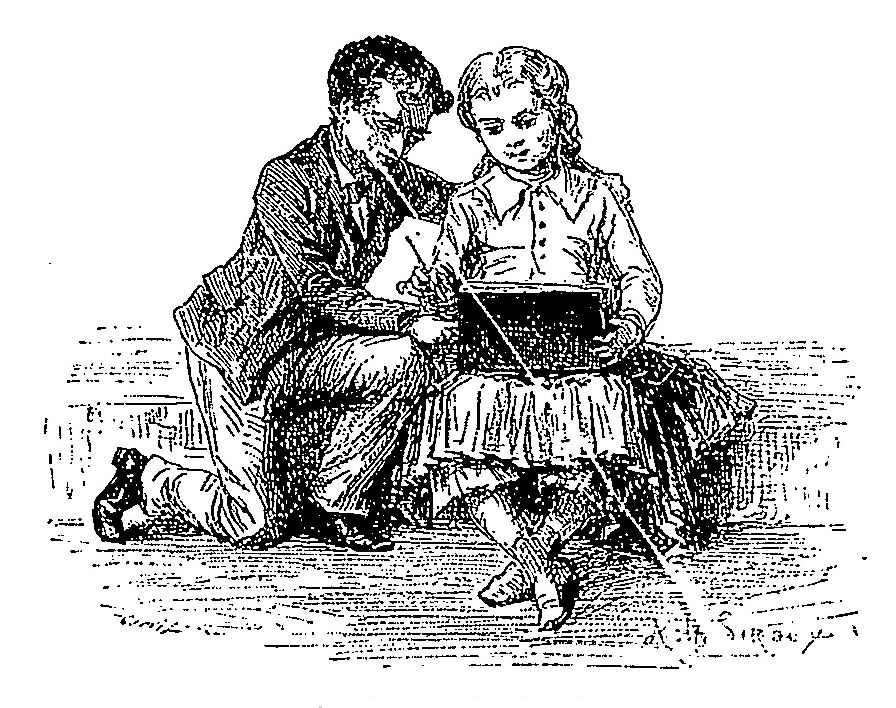 illustration du livre en djvu sur commons